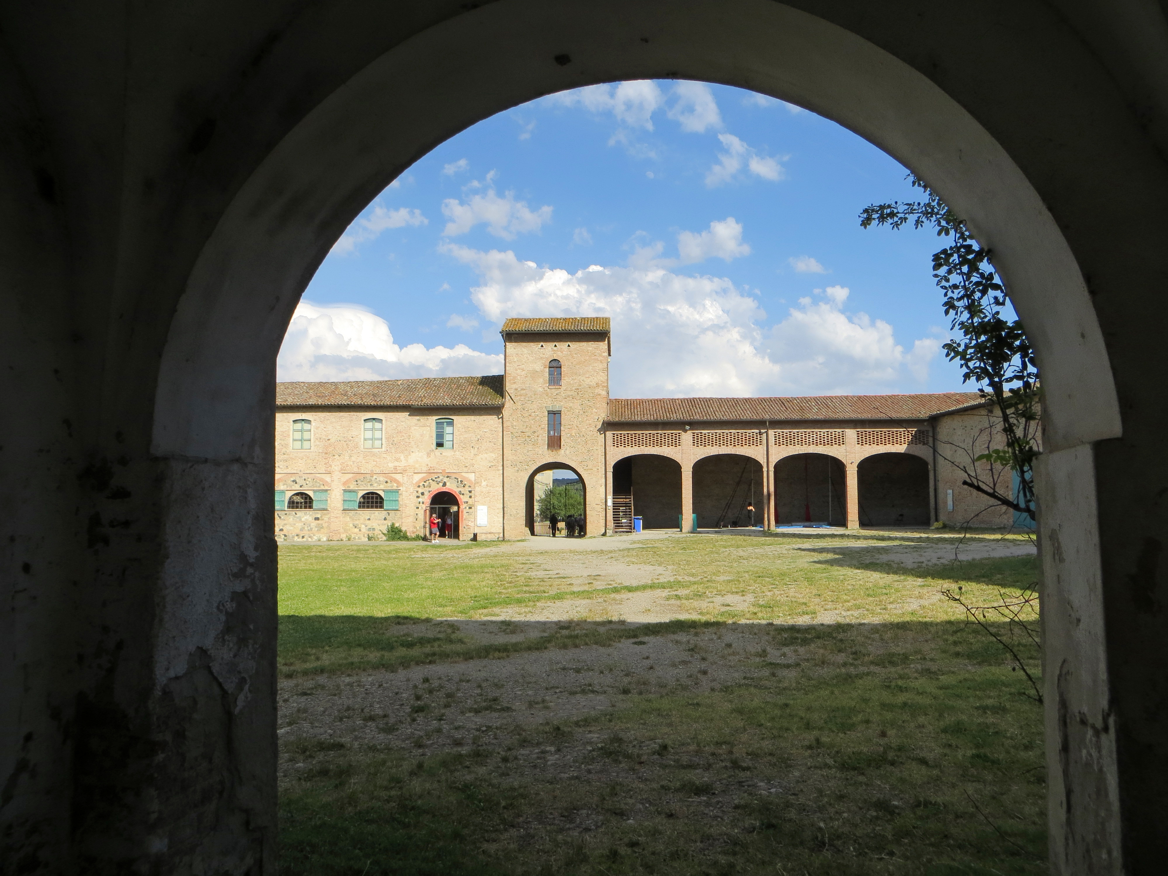 Corte di Giarola (Collecchio) - torre d'ingresso e Teatro alla Corte